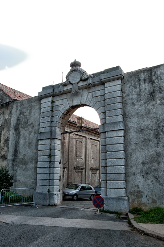 Gradska vrata u Senju